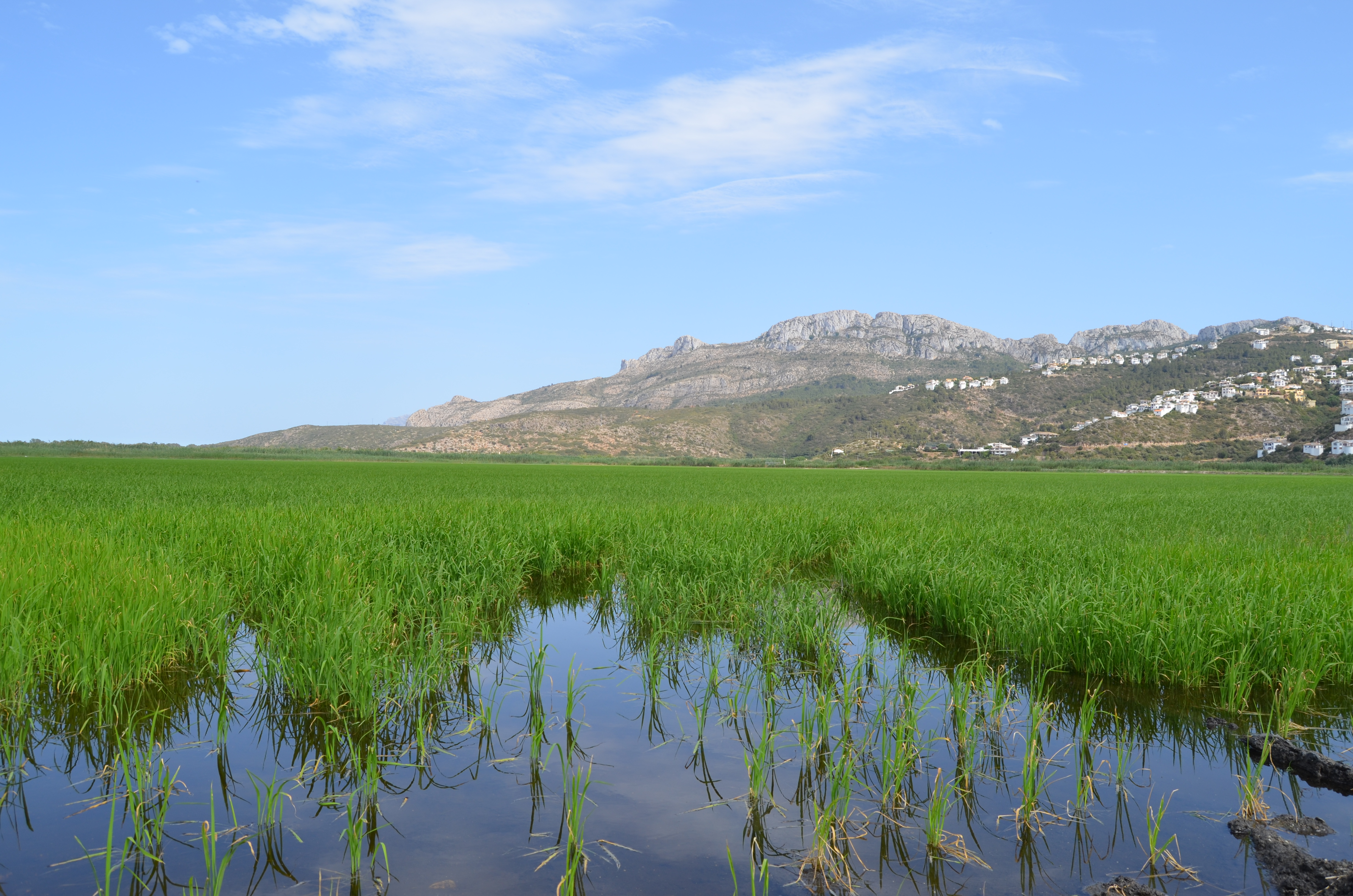 Parque natural del Marjal de Pego-Oliva This is a photography of a Site of Community Importance in Spain with the ID: ES0000147. Natura2000 entry, EEA entry